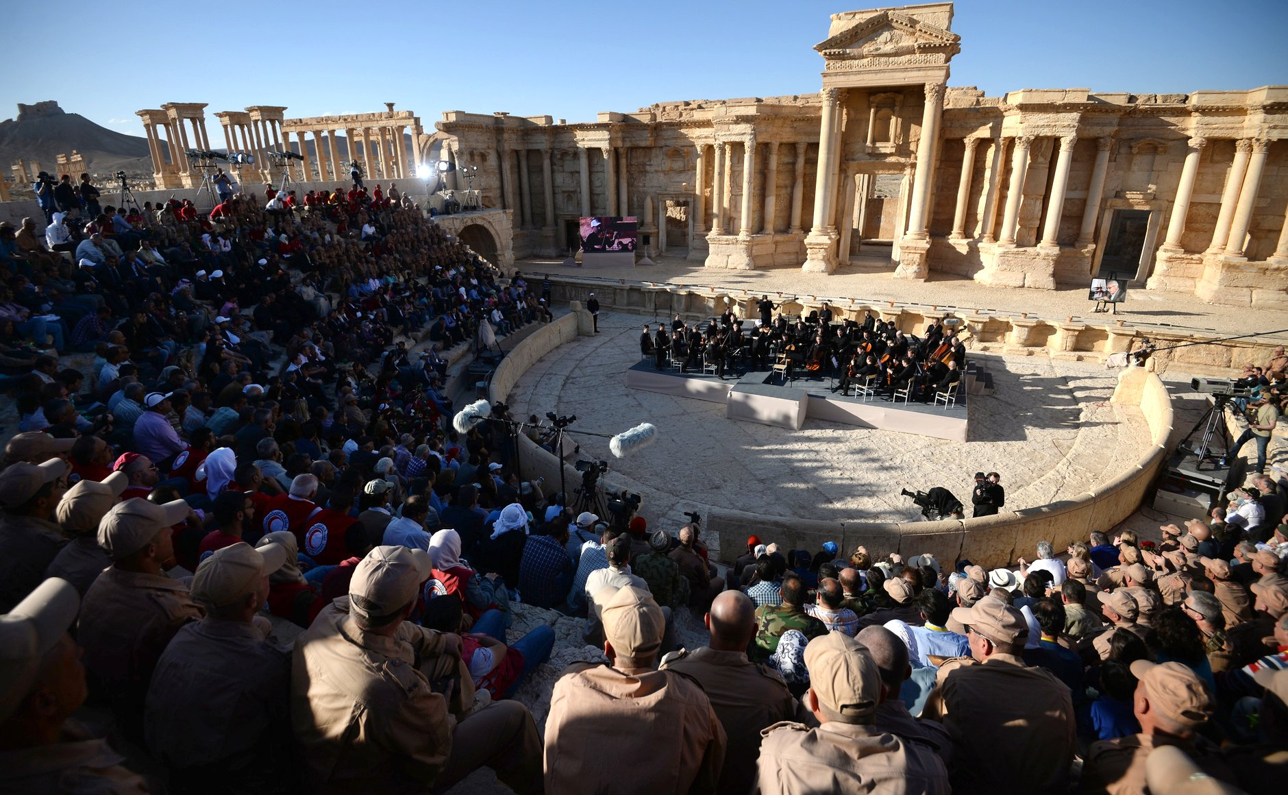 Концерт «С молитвой о Пальмире. Музыка оживляет древние стены» симфонического оркестра Государственного академического Мариинского театра под управлением народного артиста России Валерия Гергиева в сирийской Пальмире